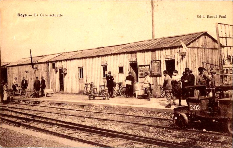 La baraque servant de bâtiment-voyageurs pendant la reconstruction de la gare après les destructions de la Première Guerre mondiale.